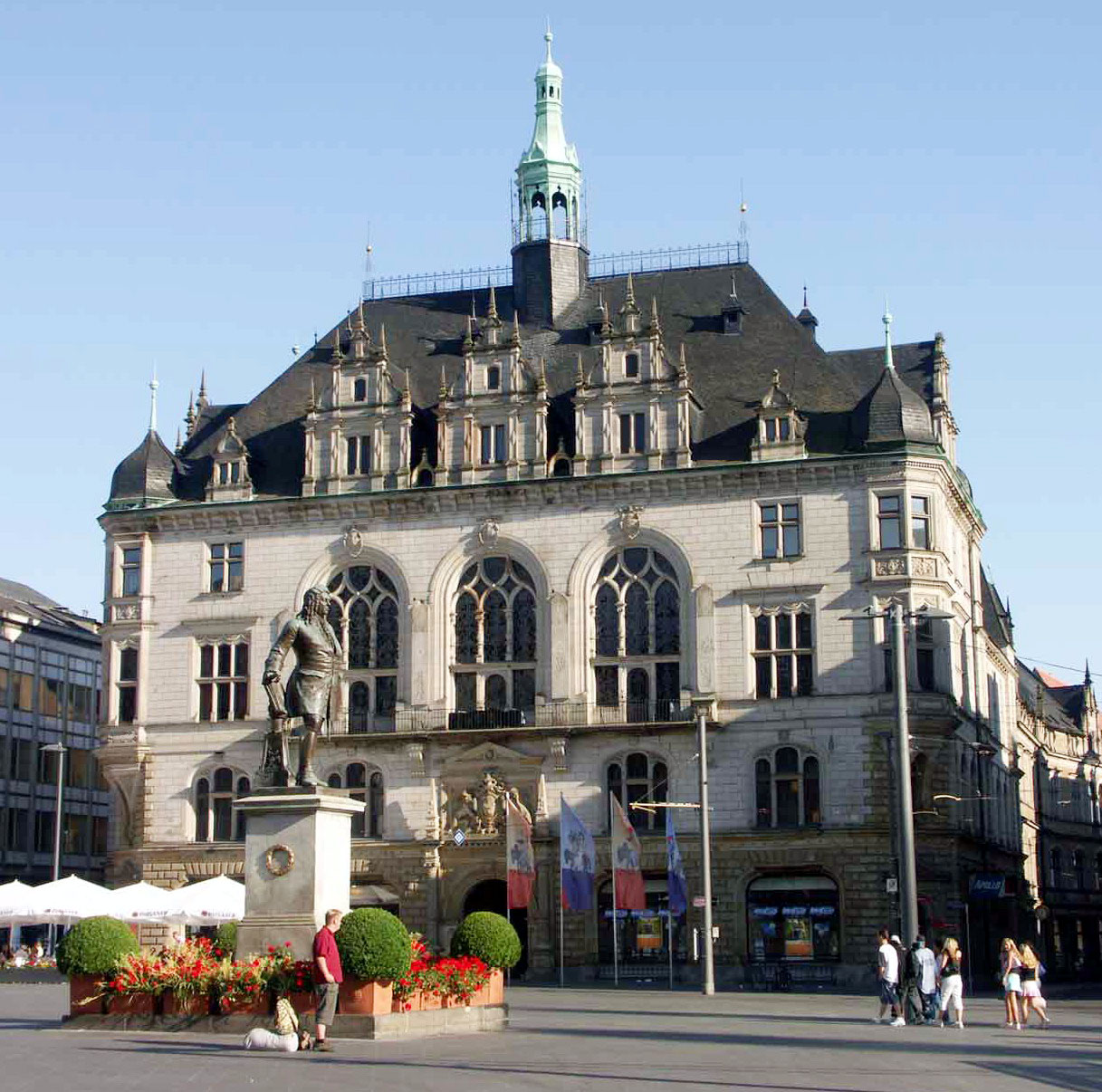 Stadthaus Halle am Markt, erbaut 1891-1894, Architekt: Emil Schreiterer, davor Denkmal Georg Friedrich Händel.